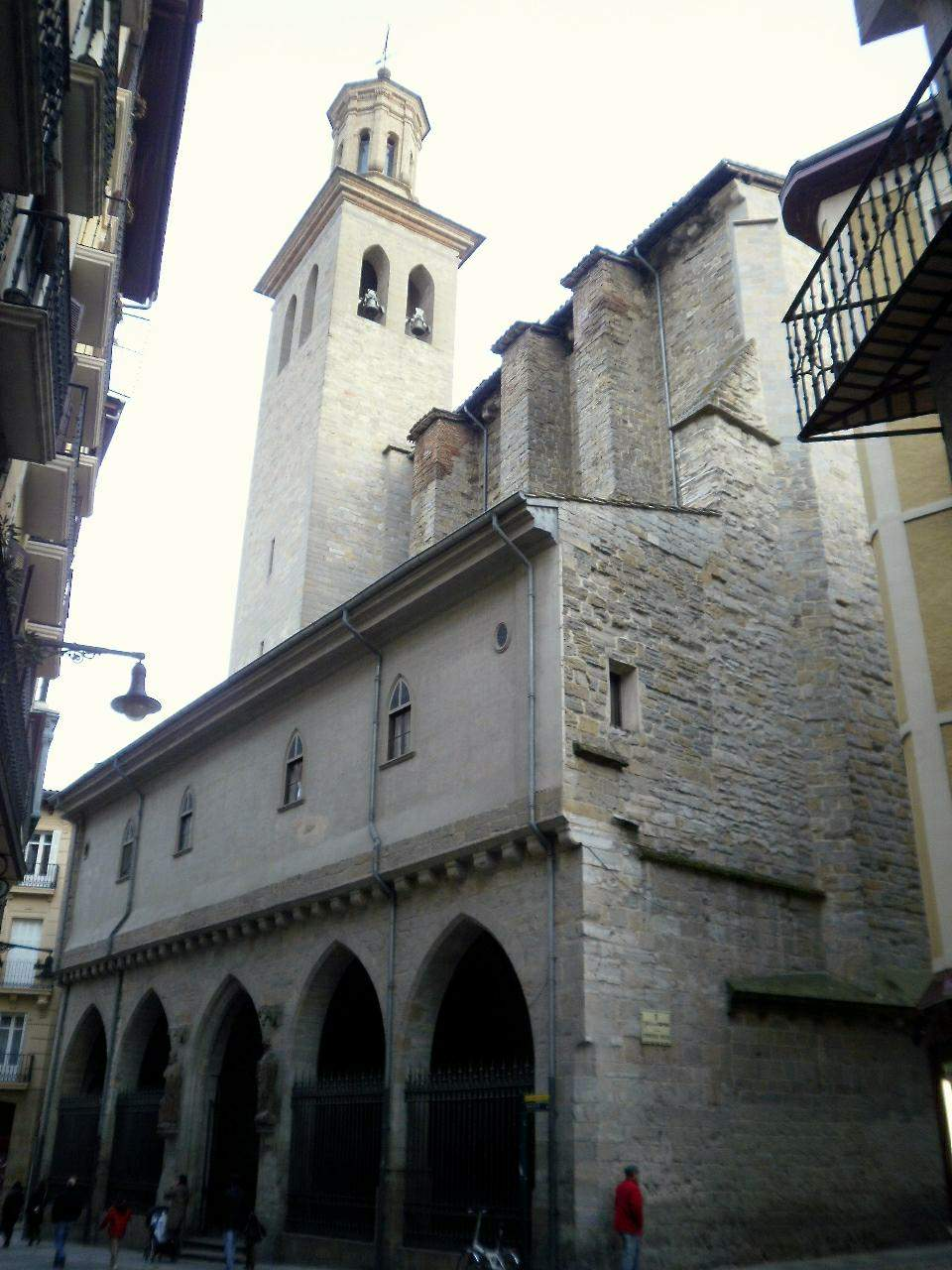 Iglesia de San Cernin o San Saturnino (Pamplona)